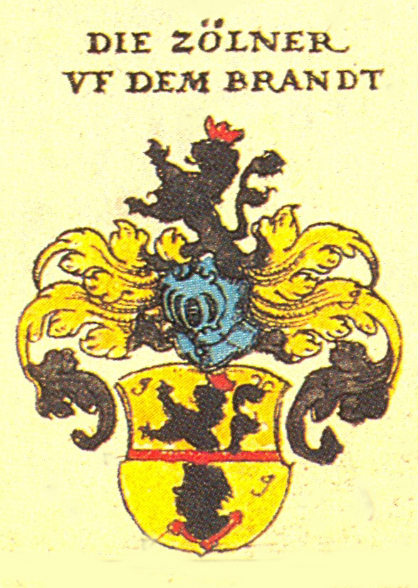 Wappen der Bamberger und Nürnberger Patrizierfamilie Zollner vom Brand (auch: Zollner von Brandt). Die Zollner waren auch als Ritter im fränkischen Adel immatrikuliert.